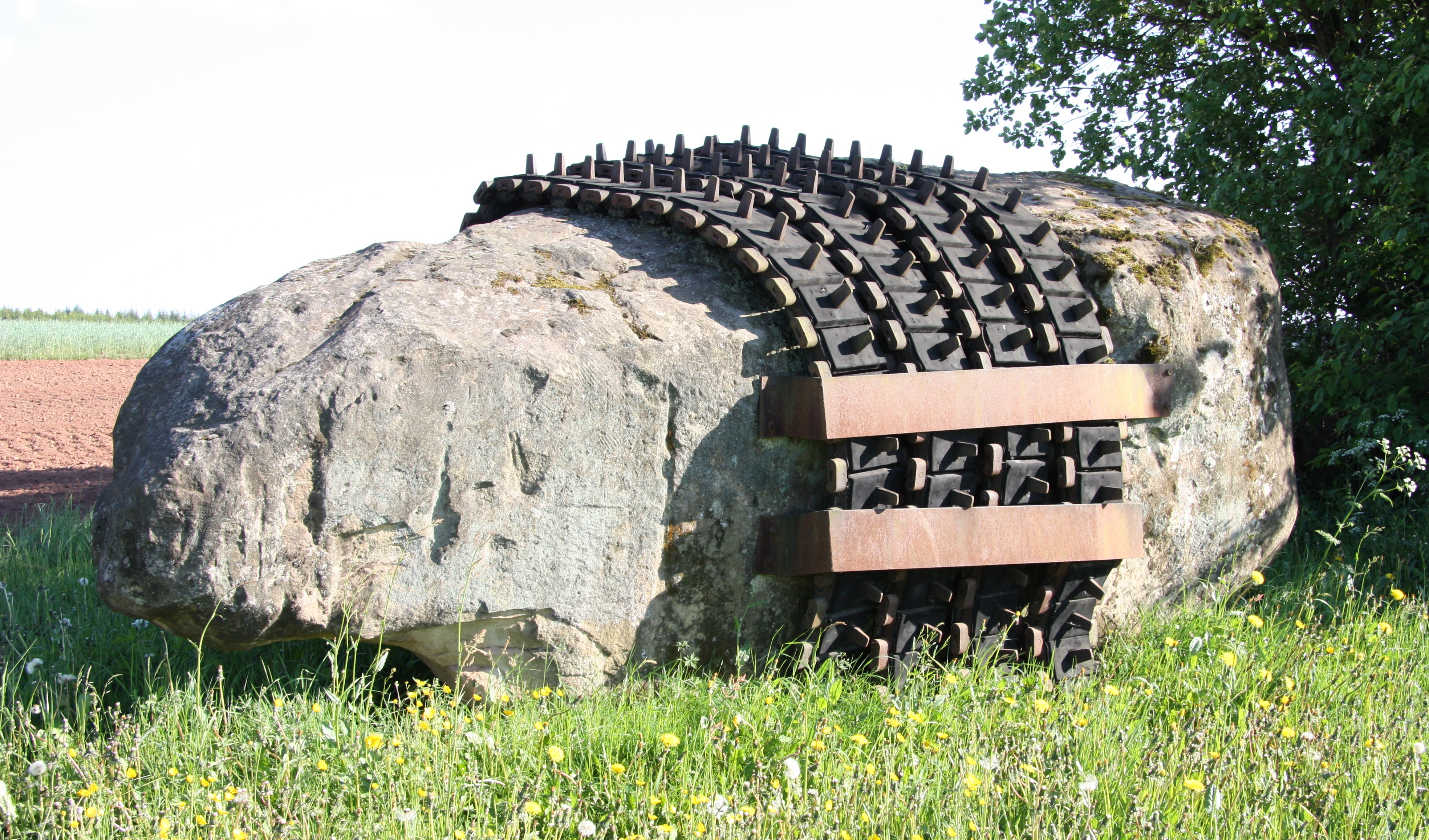 „Overkill 1982 — Die Kräfte der Steine und die Kräfte, die Steine bersten lassen“ des Bildhauers Hans-Jürgen Breuste an der Straße der Skulpturen.